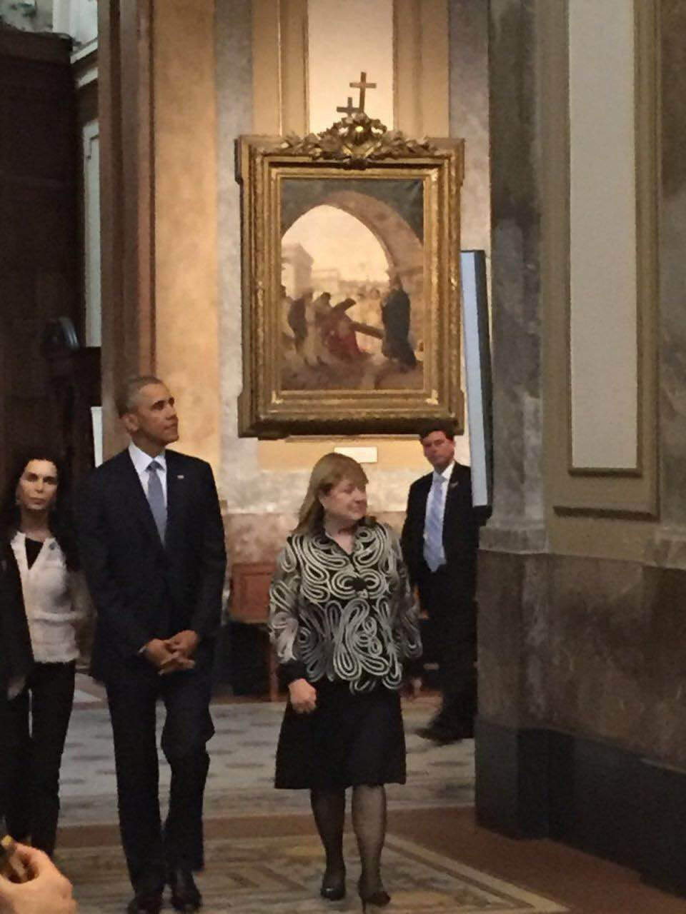 El presidente de los Estados Unidos Barack Obama junto a la canciller argentina Susana Malcorra en la Catedral Metropolitana de Buenos Aires